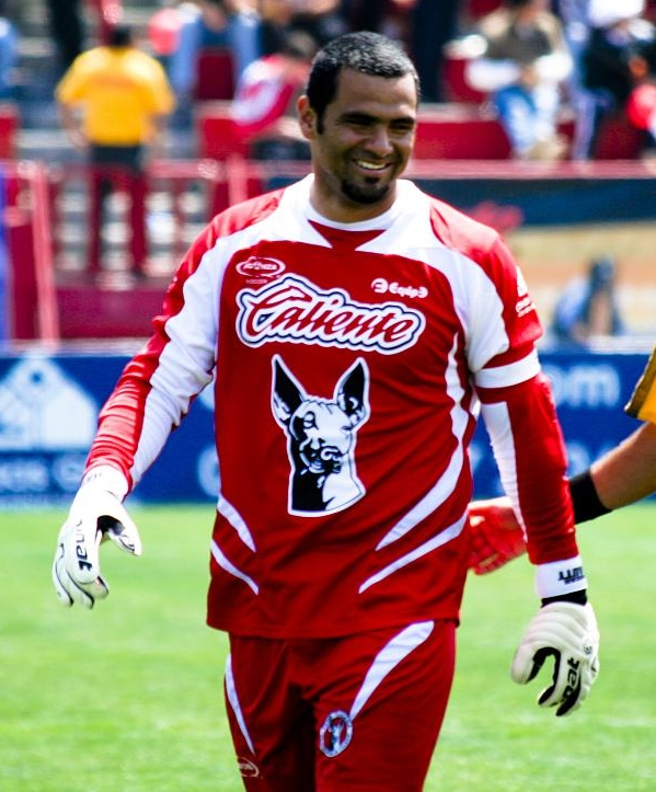 Óscar Dautt, mexican goalkeeper